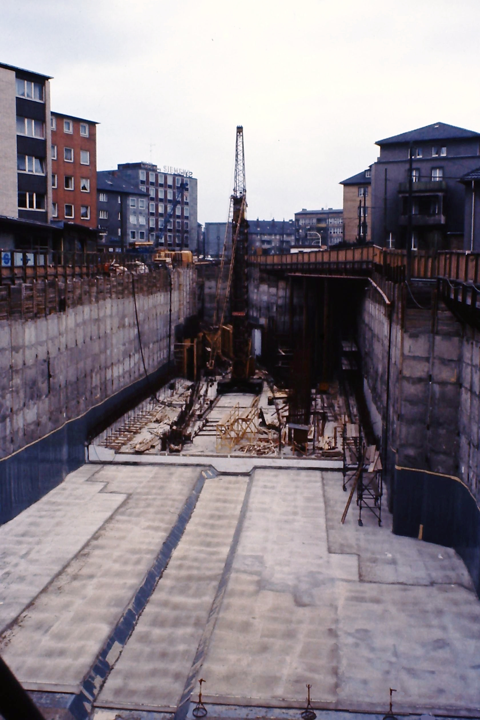 Bau der U-Bahnstation Schauspielhaus in offener Bauweise